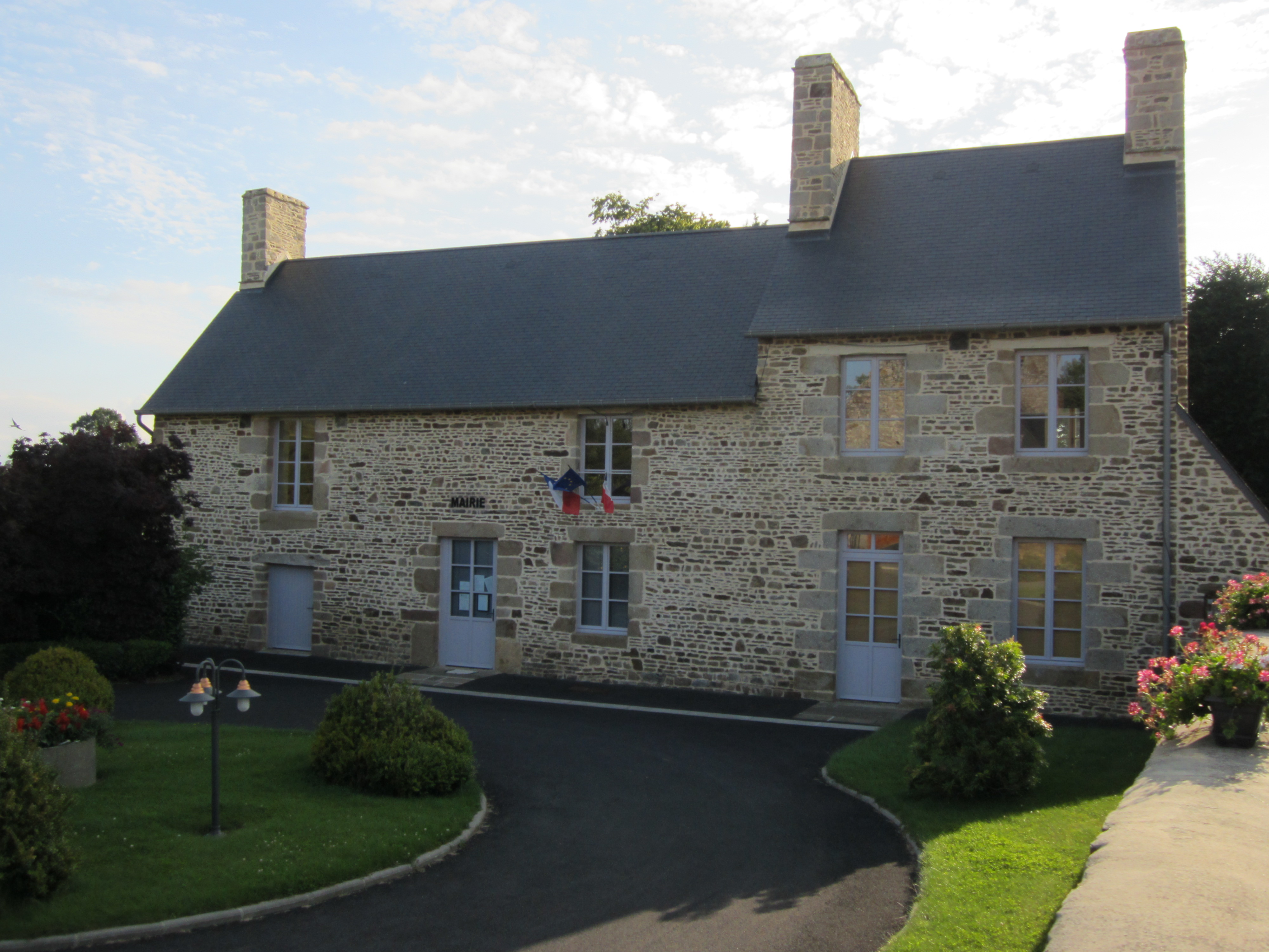 Moulines, Manche